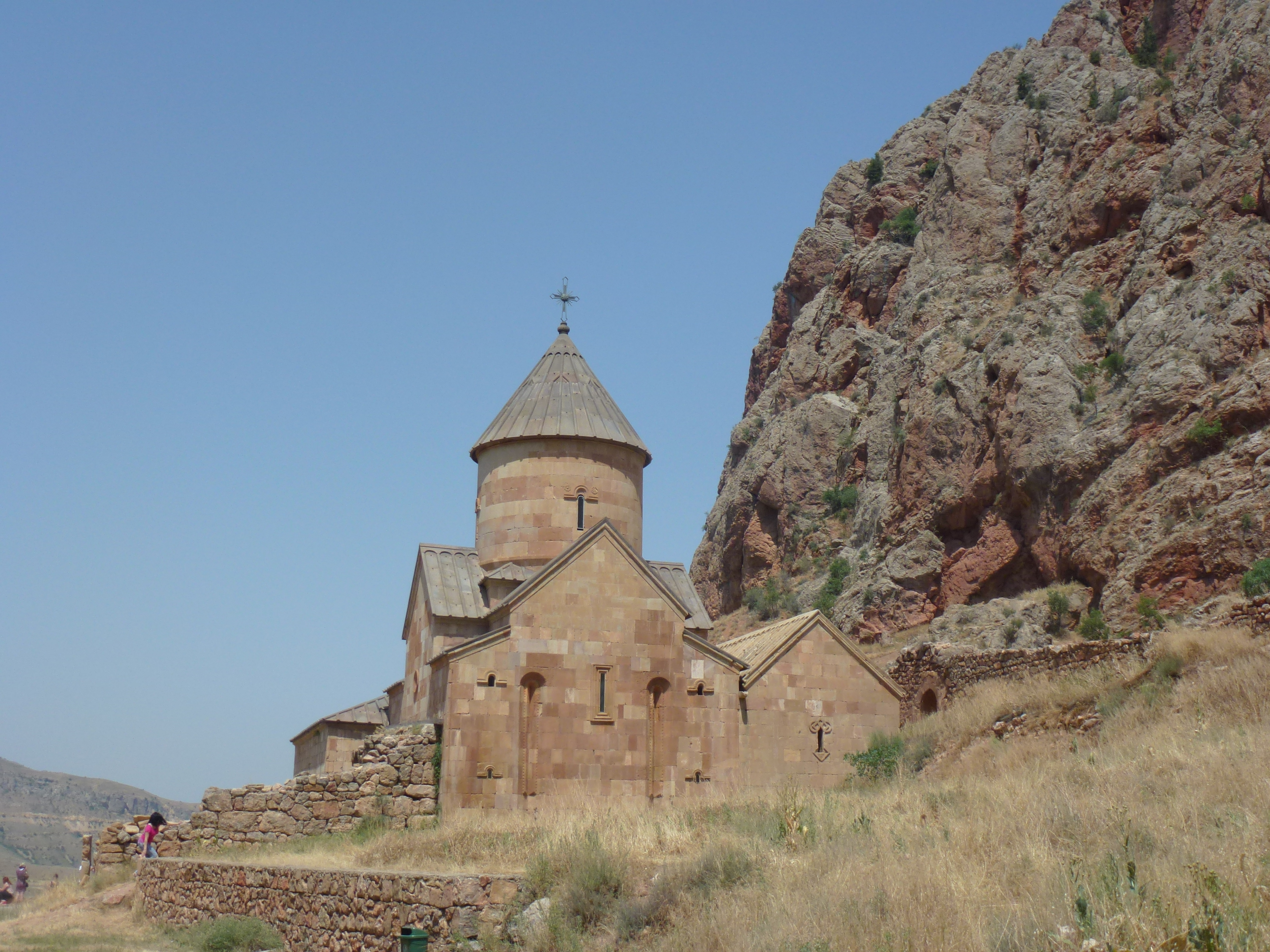 Նորավանք, Ամաղու, Հայաստան 8.1/1